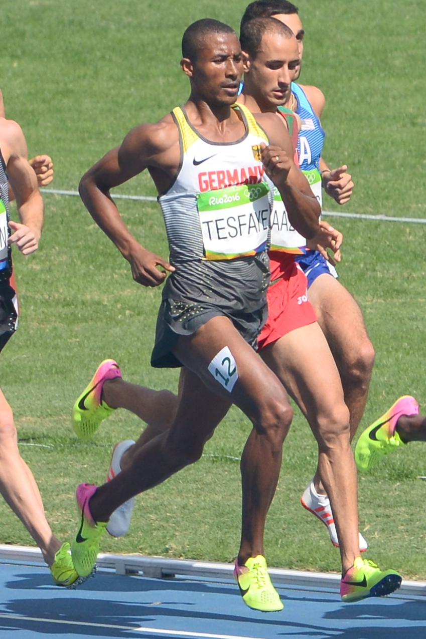 Série du 1500m lors des JO en 2016